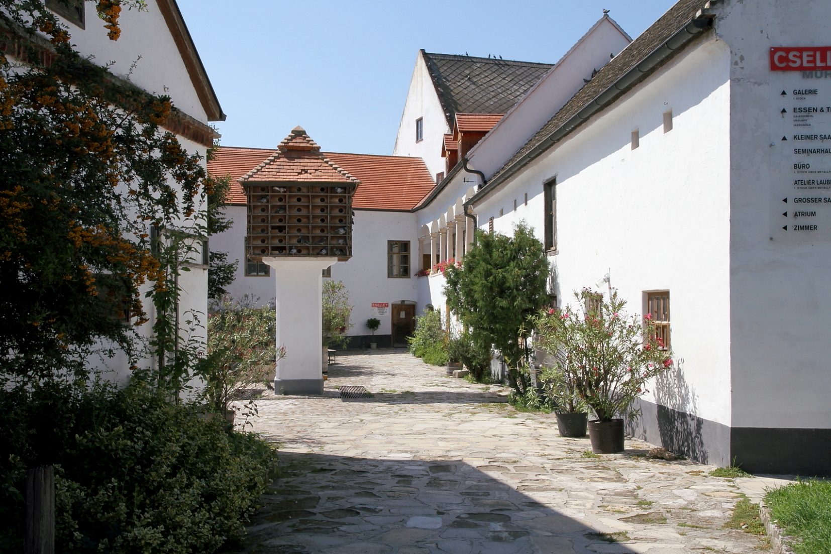 Die Cselleymühle mit dem markanten Taubenschlag auf Steinpfeiler in der burgenländischen Gemeinde Oslip.